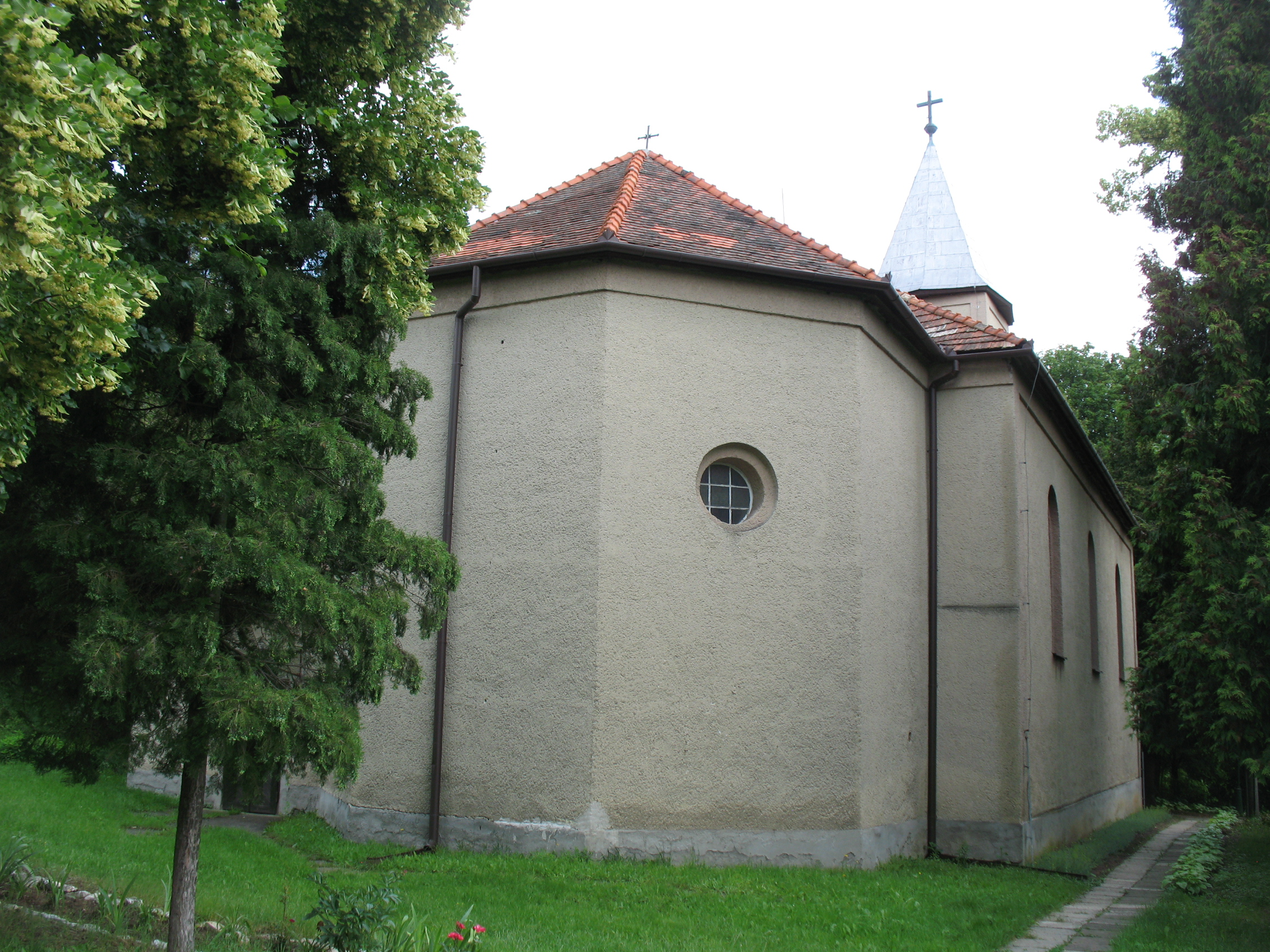 Alsószemeréd